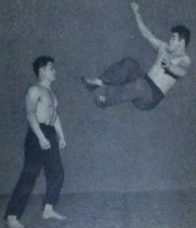 遠藤幸吉によるドロップキック